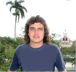 Ángel Martínez Niubó, escritor cubano